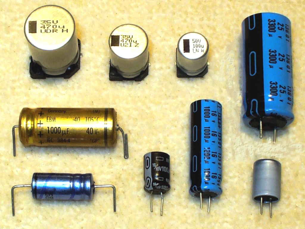 Bedrahtete radiale und axiale Elkos sowie SMD-Elkos